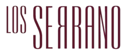 Serrano